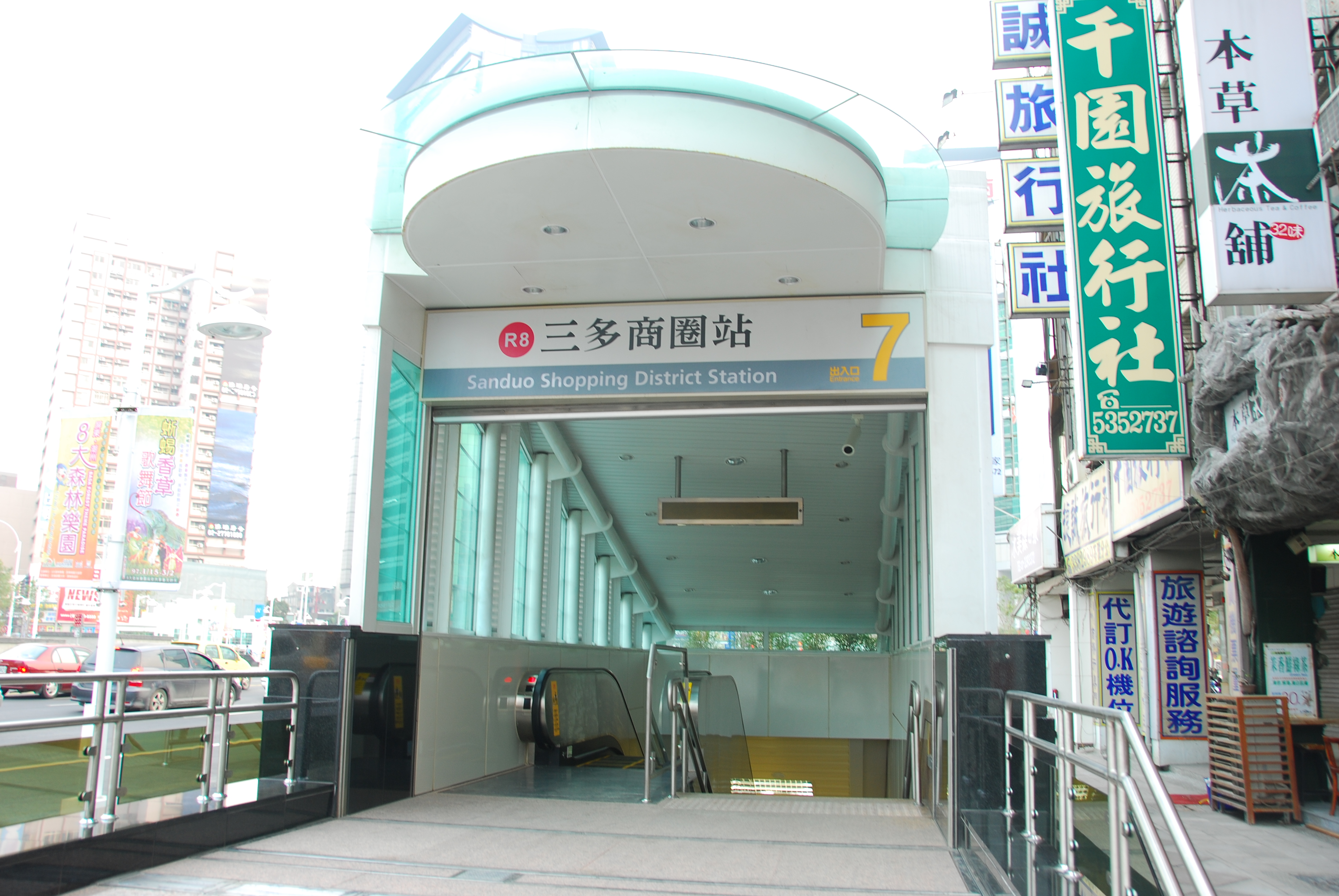 高雄捷運紅線三多商圈站七號入口